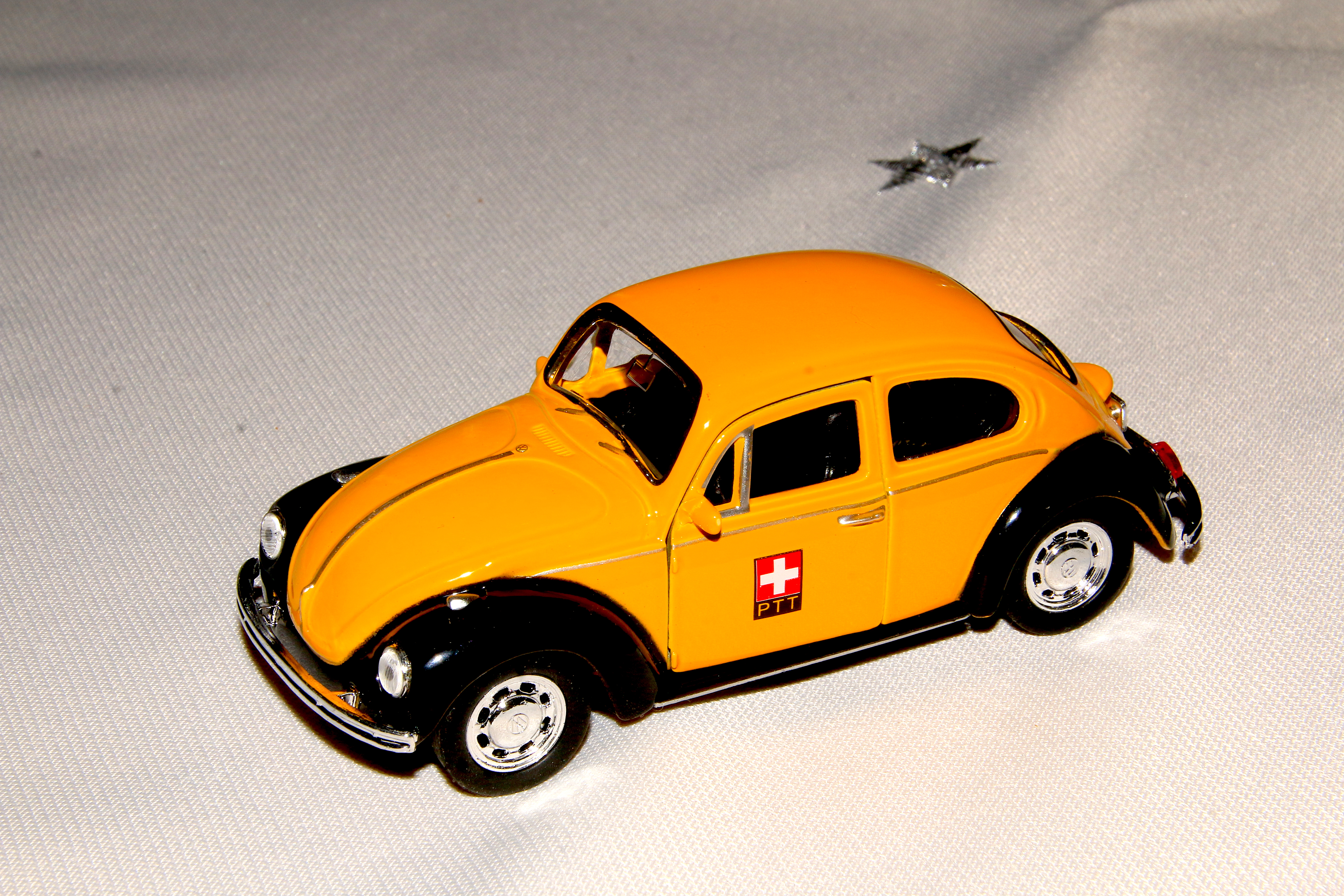 PTT VW 1300 Käfer Modell